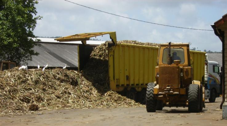 Livraison de la canne à sucre à la distillerie des rhum Saint James, Martinique